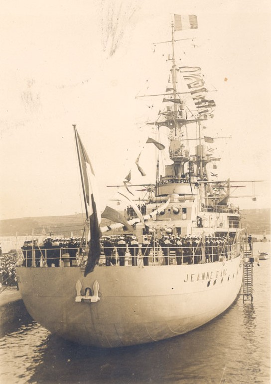 Параходът Жана д’Арк на котва в пристанището.